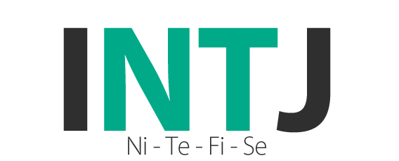 Logo INTJ MBTI.